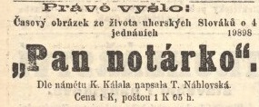 Inzerce v novinách